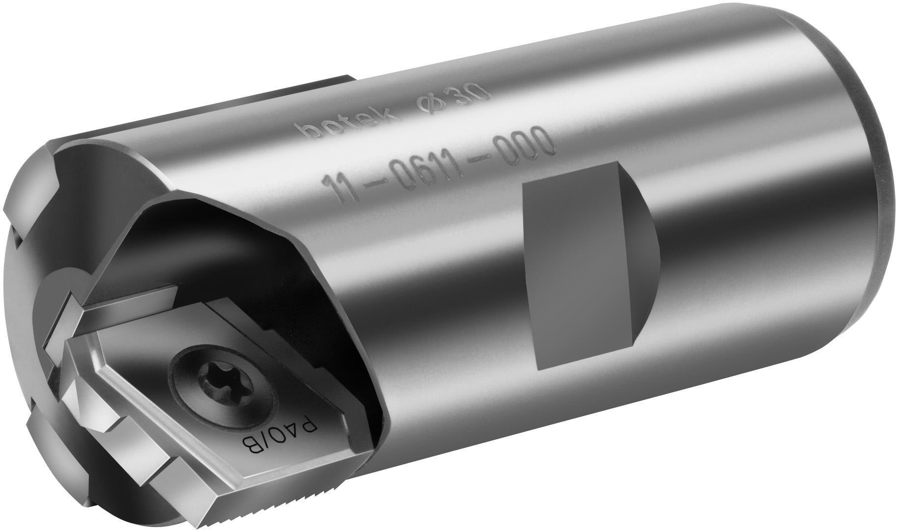 BTA-Bohrkopf mit einer Schneide der Firma Botek.